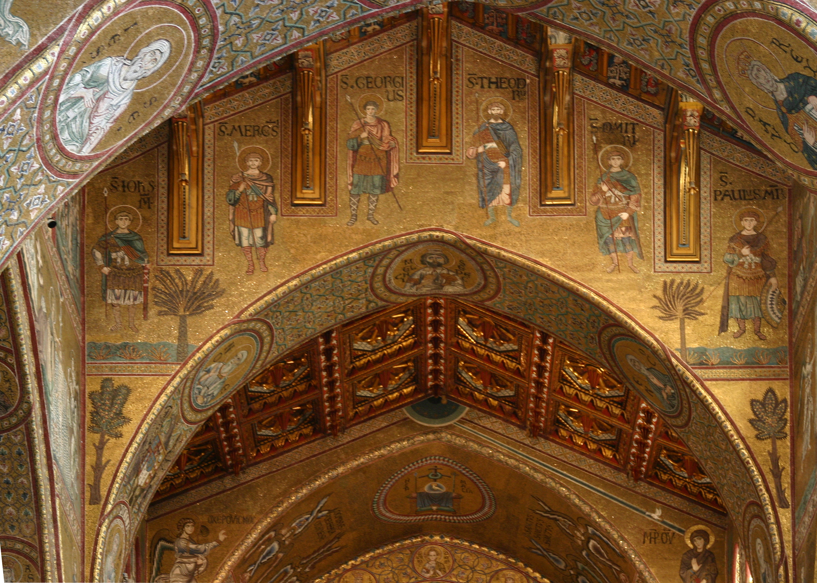 Cathedral of Monreale